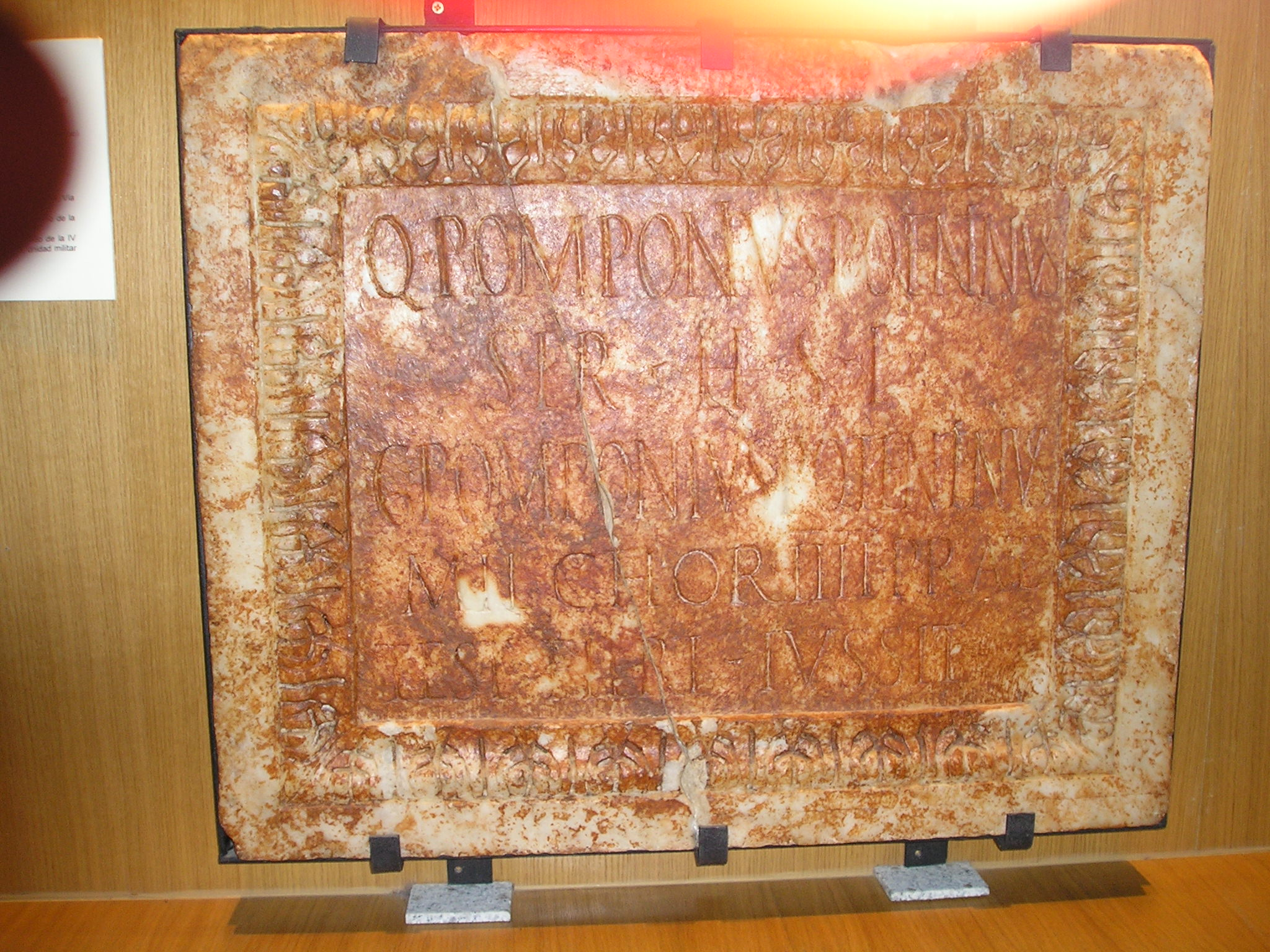 Placa funeraria de Quintus Pomponius Poeninus, dedicada por su hermano, soldado de la IV Cohorte Pretoriana en el siglo I. Museo de Cáceres. Corresponde a la inscripción AE 2004, 724.